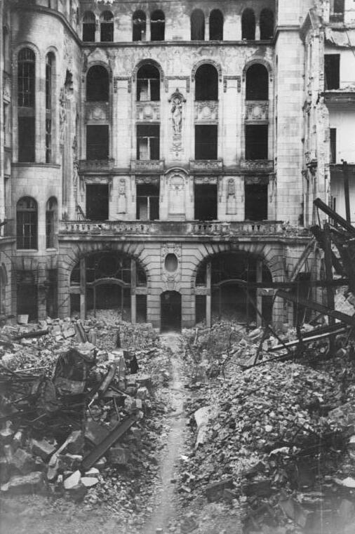 Berlin, Hotel "Adlon", Hof, Ruine Hotel Adlon der Stadt Berlin übergeführt. Die bisher unter Treuhandverwaltung stehenden Hotels "Adlon" und "Coburger Hof" wurdenin den Besitz der Stadt Berlin übergeführt. Vertreter des Magistrates darunter Stadtrat Hinze und Wirtschaftssachverständige besichtigten am 14.7.50 das Hotel Adlon und sprachen # Wiederausbau des Hotels. # B.z.: So darf der Hof eines unserer repräsentativsten Hotels nicht aussehen.